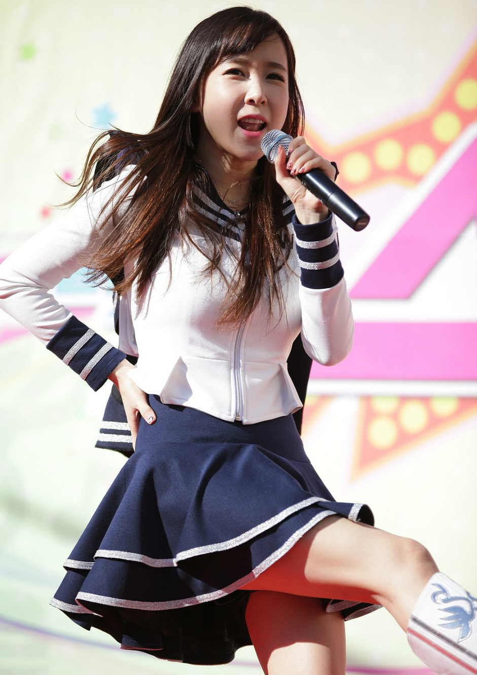 크레용팝(Crayon Pop) 도시 꼬마들의 행복한 축제 티브로드 원음방송